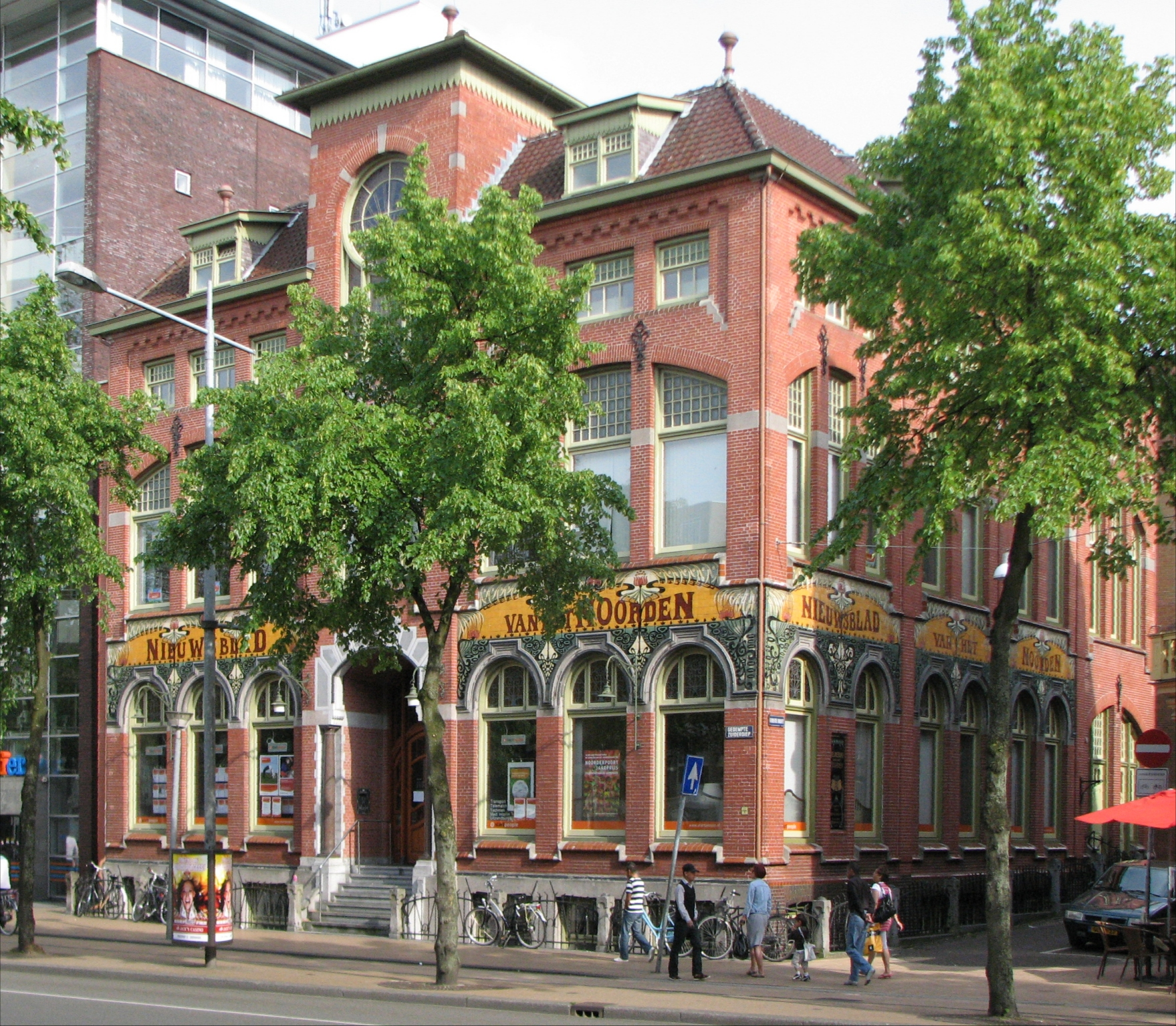 The old "Nieuwsblad van het Noorden" building at the Gedempte Zuiderdiep 24